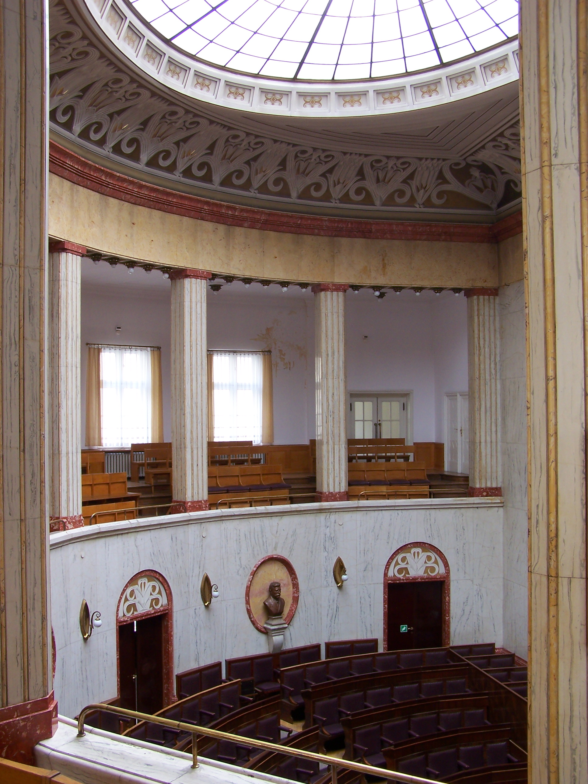 Sala obrad w gmachu Urzędu Wojewódzkiego w Katowicach.